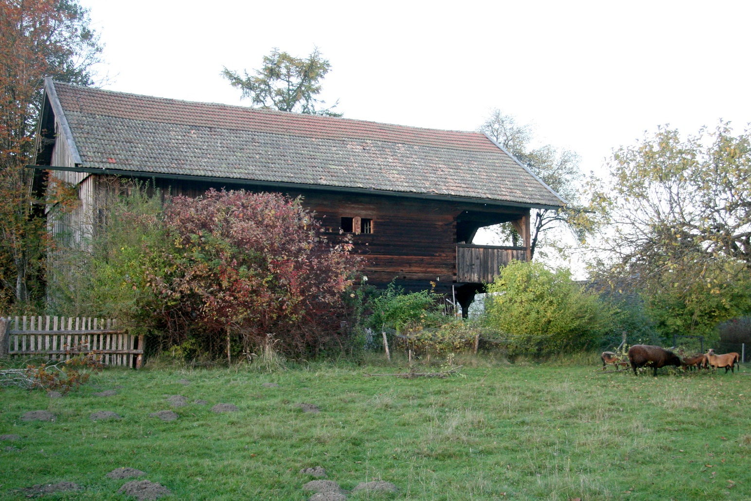 Getreidekasten in Eitzenberg, Gemeinde Iffeldorf: zweigeschossiger Getreidekasten, bezeichnet mit dem Jahr 1604. This is a photograph of an architectural monument.